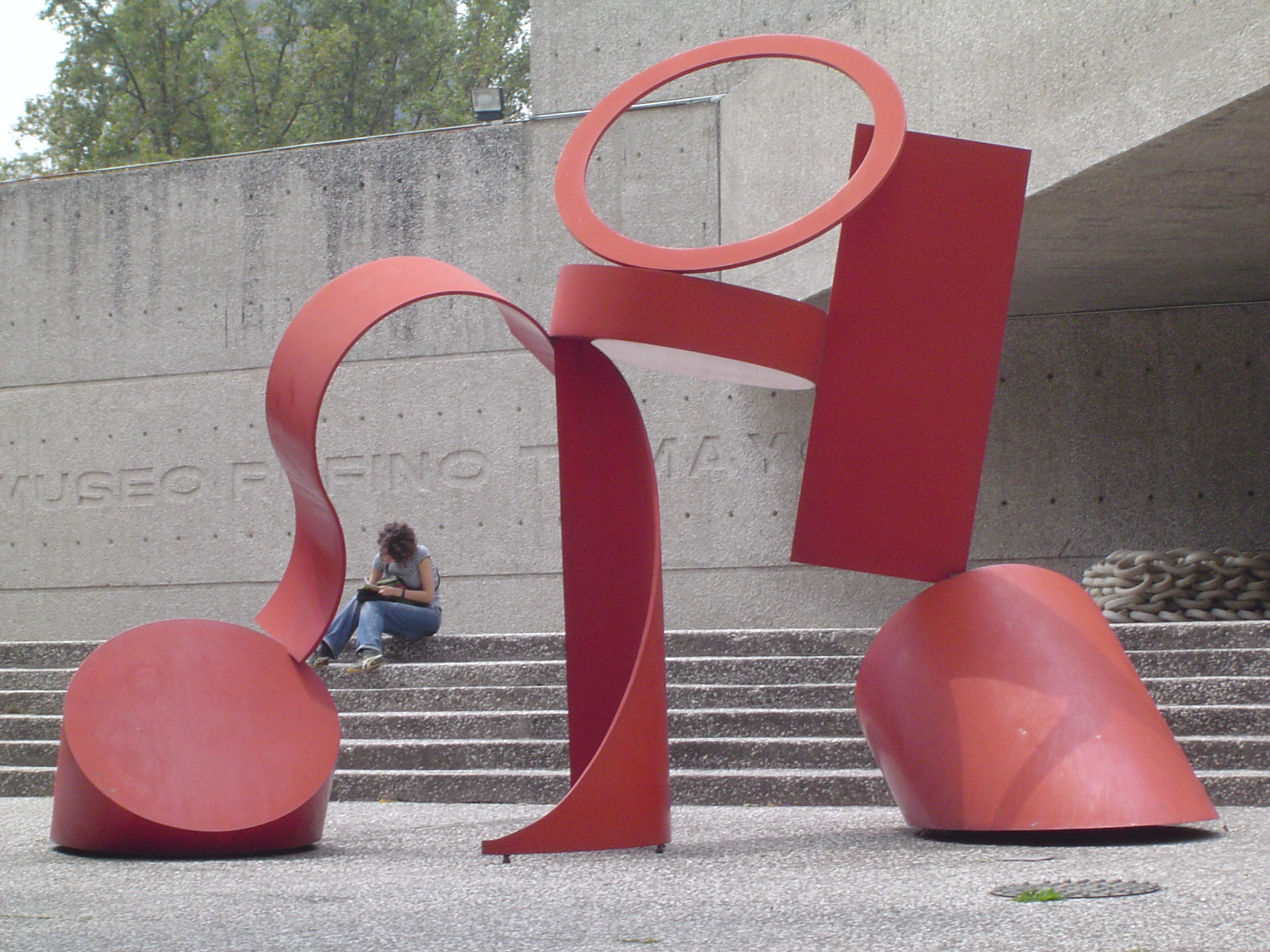 entrada del museo rufino tamayo en chapultepec.JPG